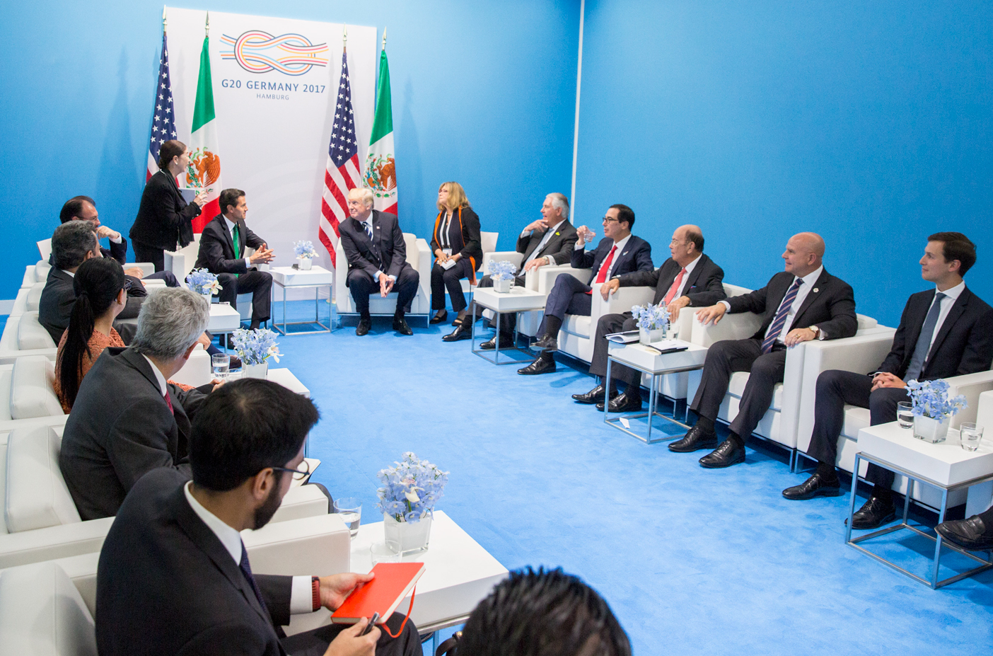 Cumbre de Líderes del G20